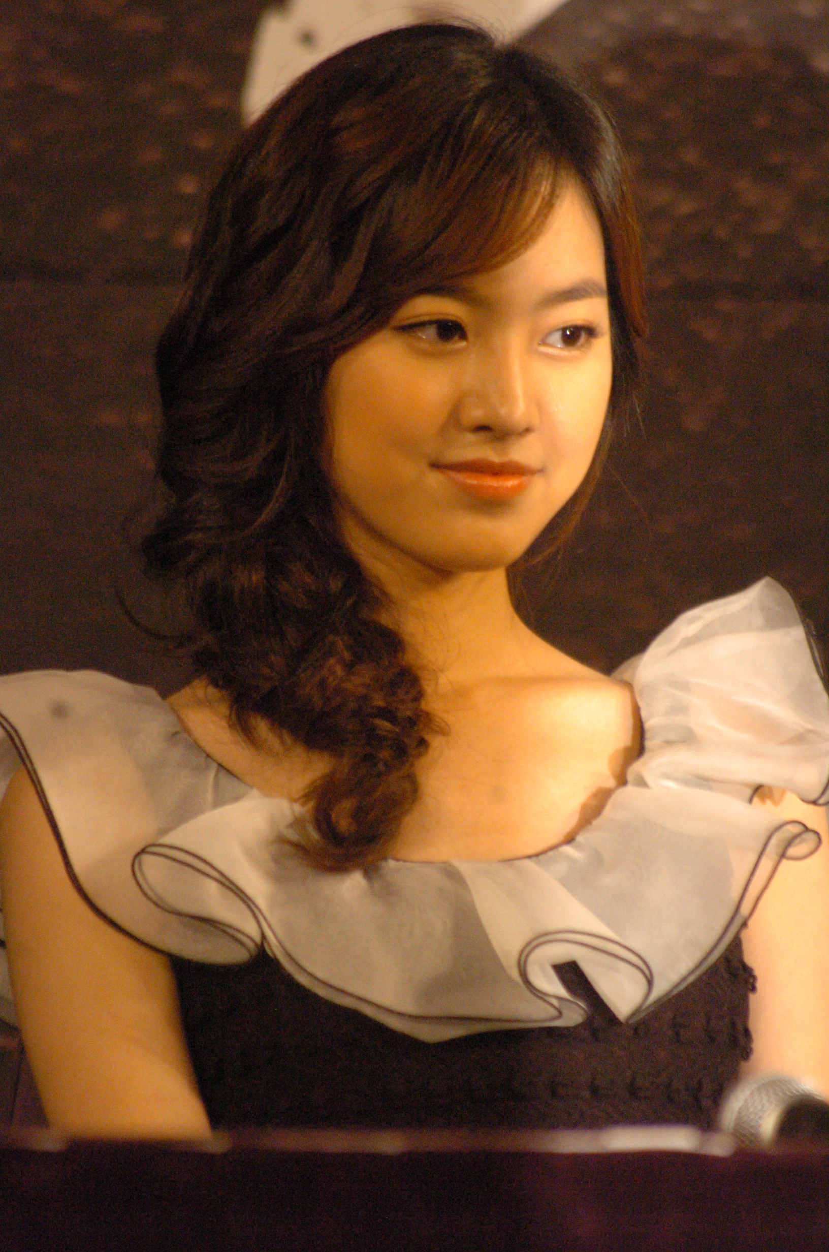 각시탈&픽시로트쇼케이스 .